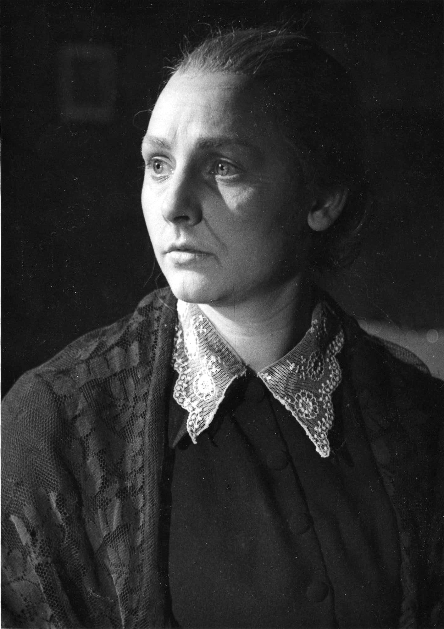 Karel Capek / matka